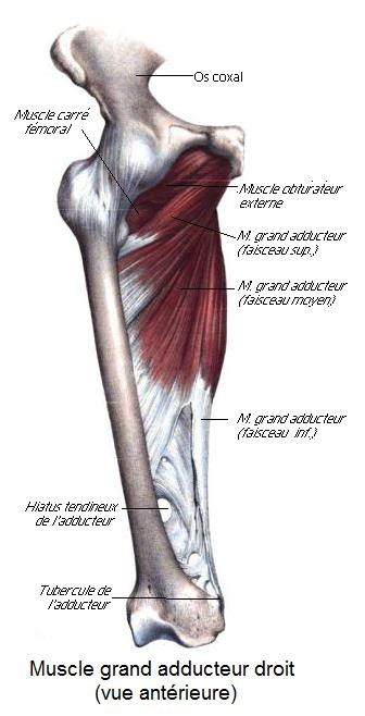 Muscle grand adducteur